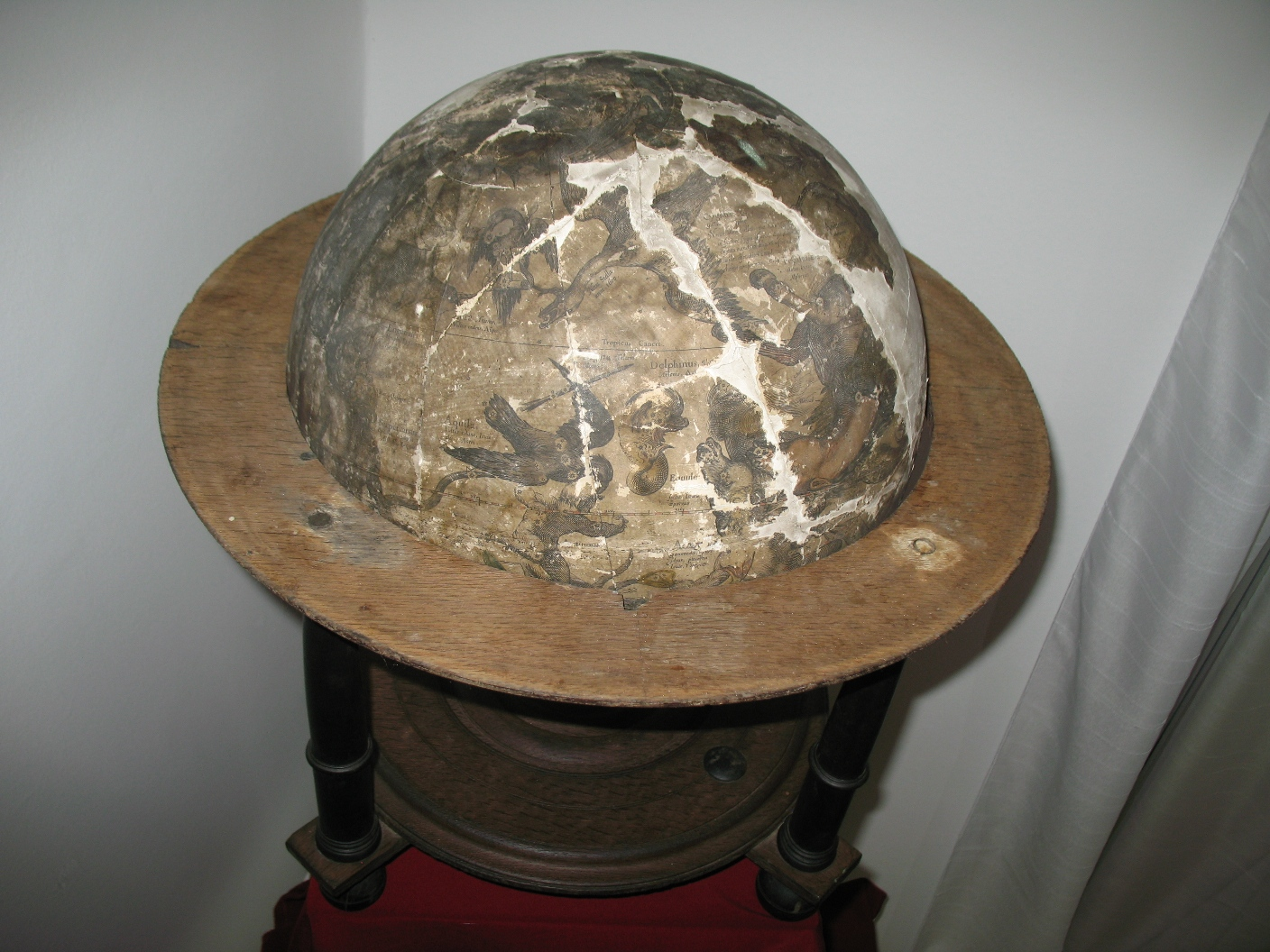 Duna Menti Múzeum jubileumi (125) kiállítása